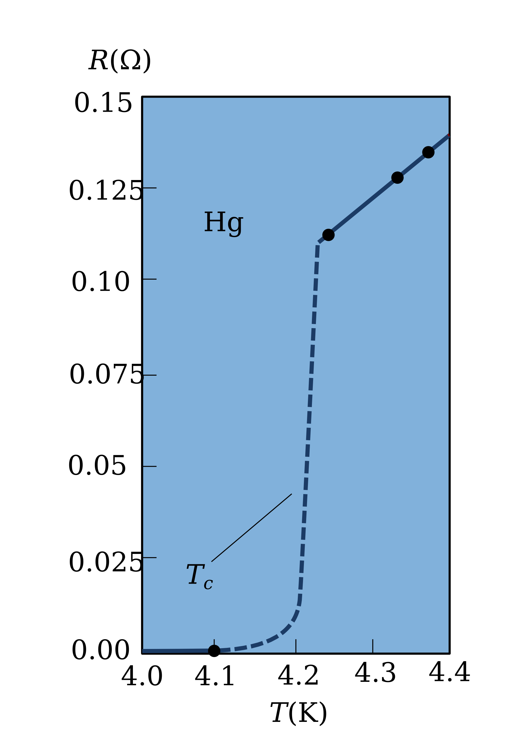 Resistencia en función de la temperatura para una muestra de mercurio. La gráfica comprende la de un metal normal sobre la temperatura crítica, la cual es de 4,2 K para el mercurio.